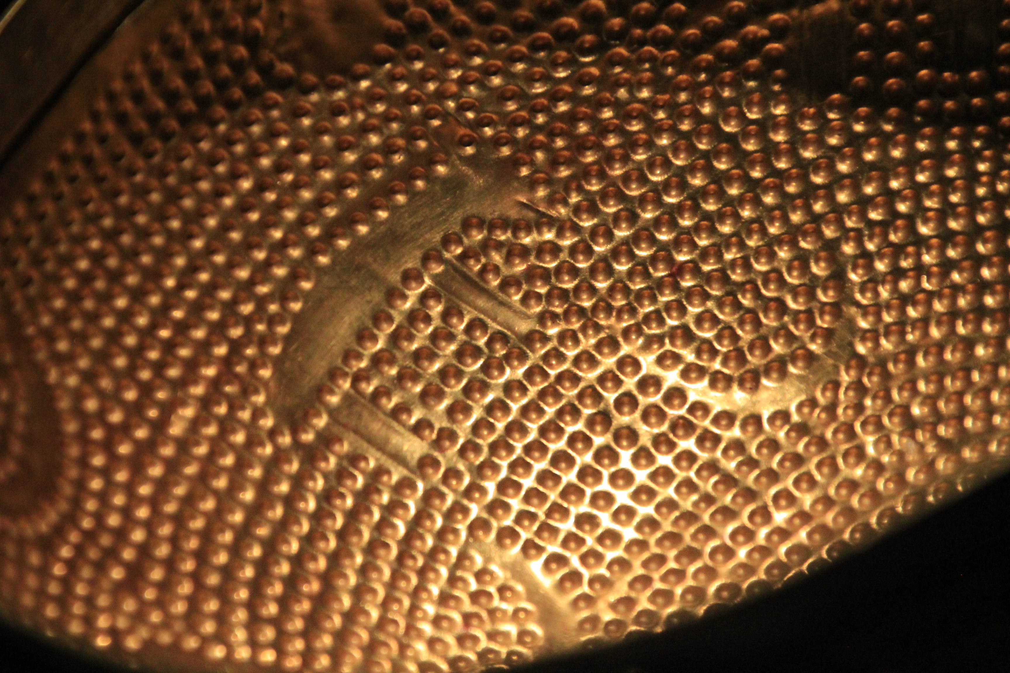 Detail Goldschale von Altstetten, Landesmuseum Zürich